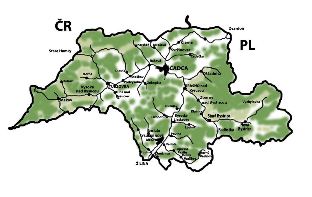 kysuce